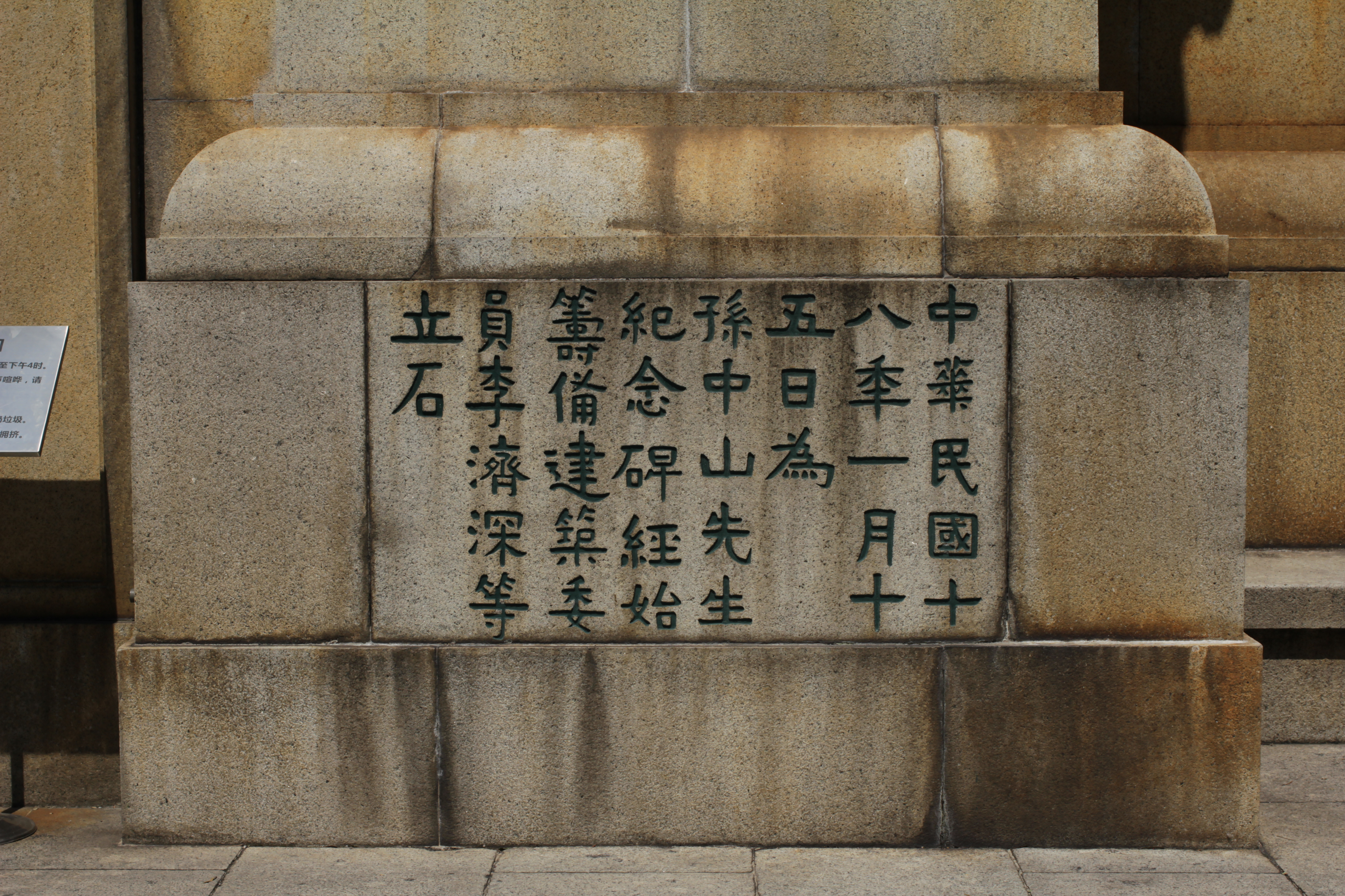 孫中山先生紀念碑奠基。 中華民國十八年一月十五日為 孫中山先生紀念碑經始籌備建築委員李濟深等立石